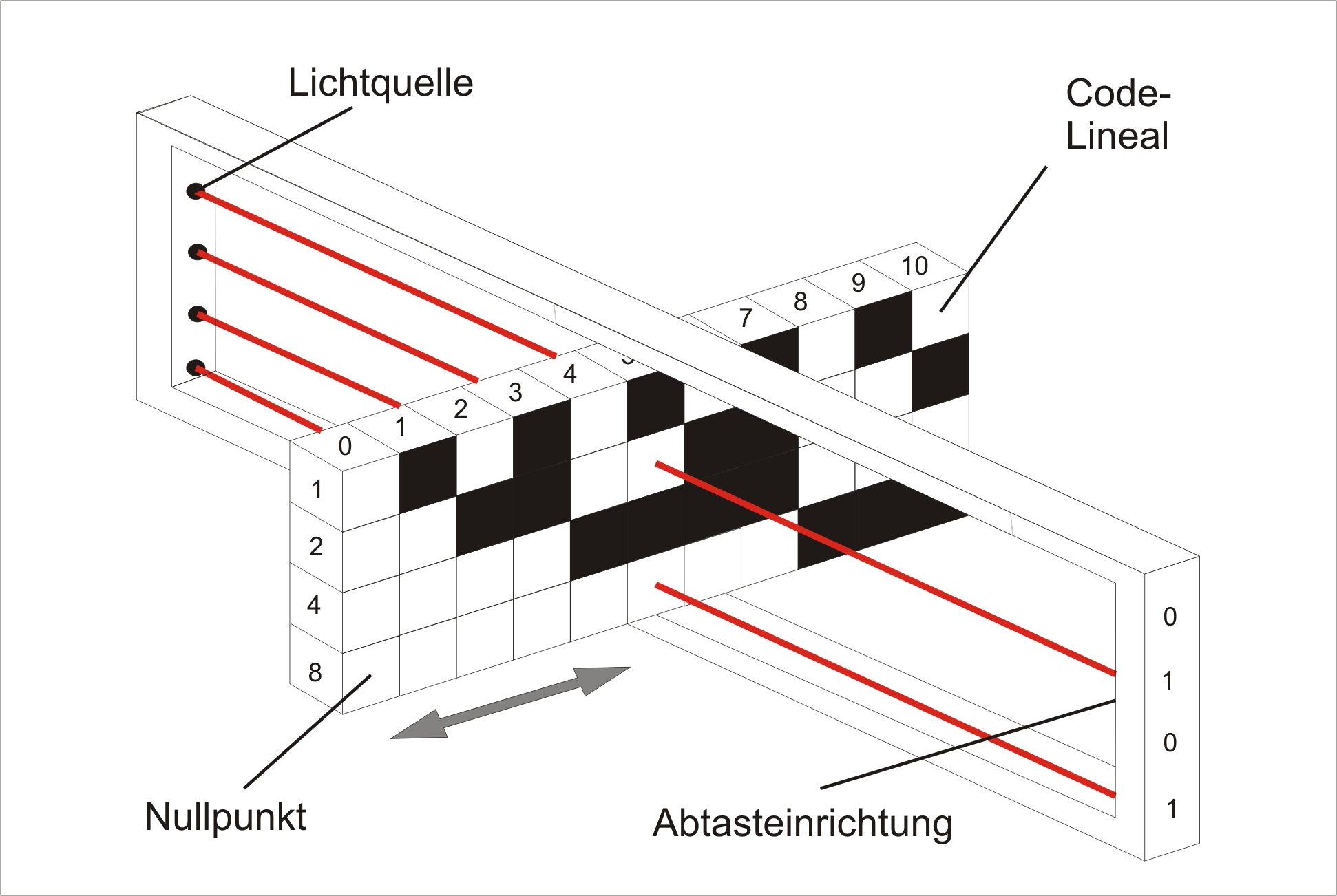 Absolutwertgeber